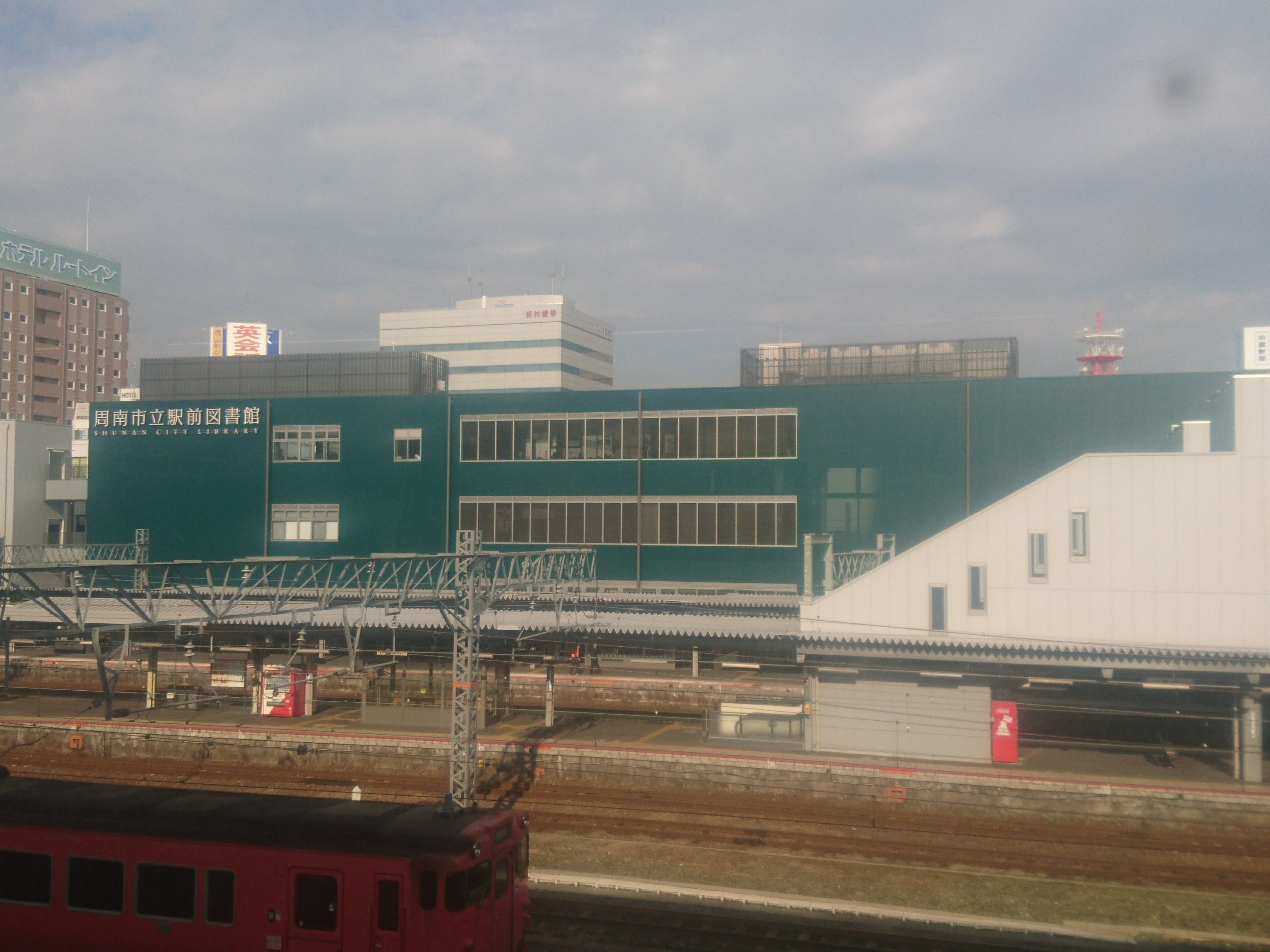 徳山駅前図書館 （線路側・新幹線駅舎より撮影）